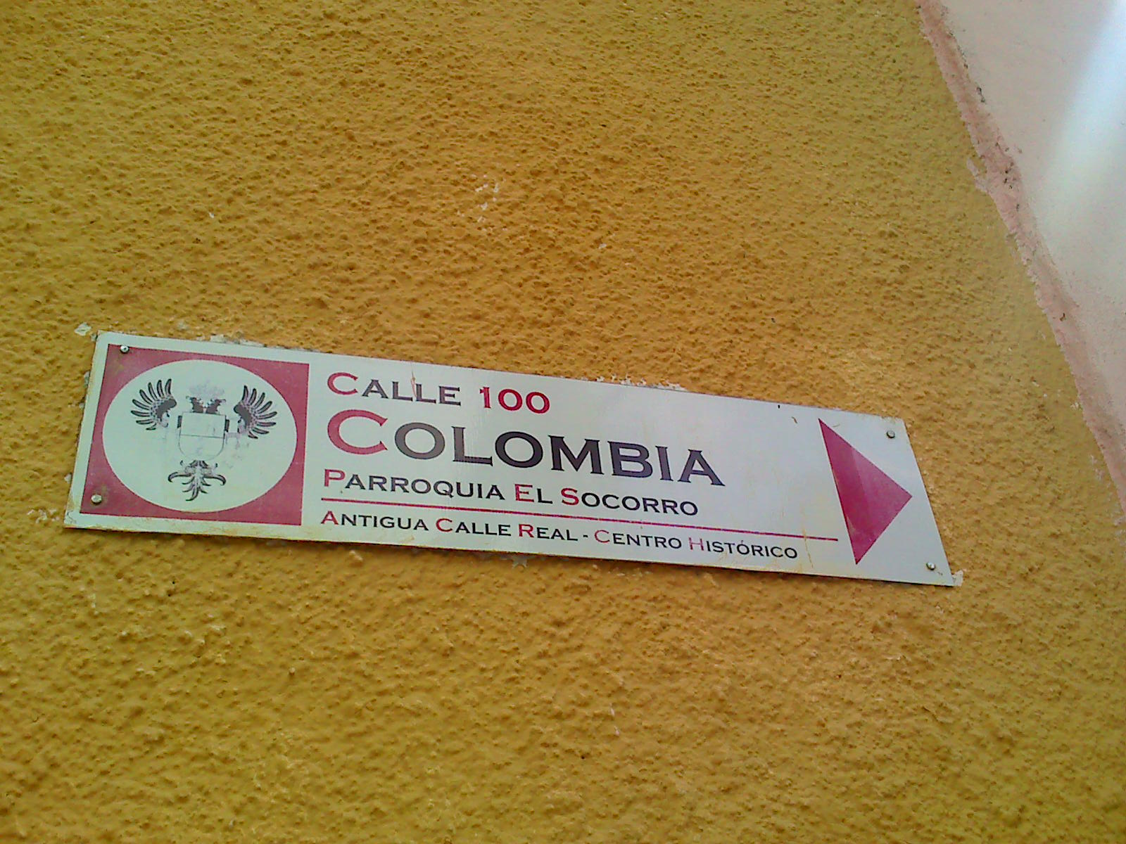 Aviso indicando la dirección de la Calle Colombia, antigua Calle Real en la época de la colonia. Valencia, Venezuela.